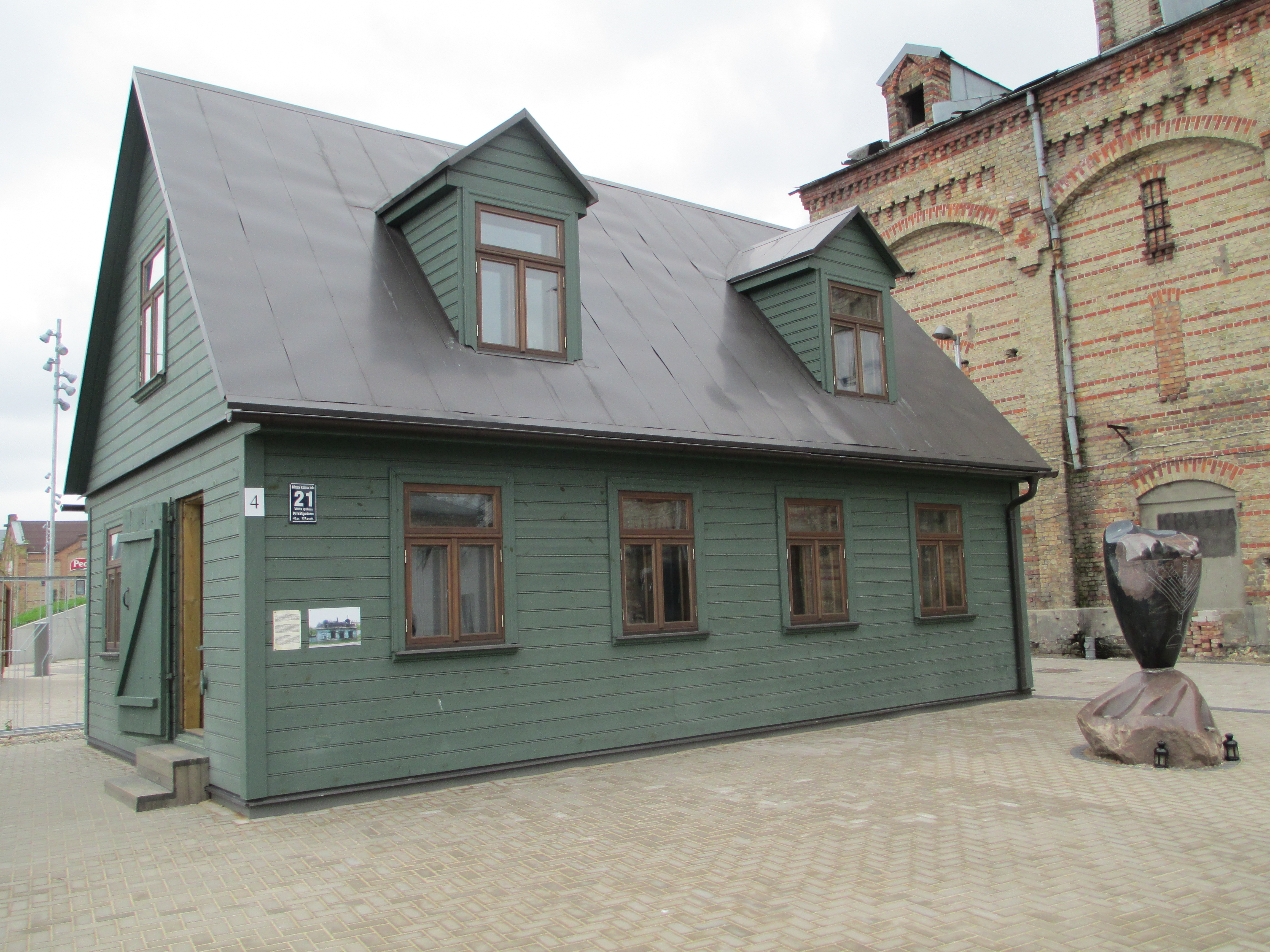 מוזיאון גטו ריגה